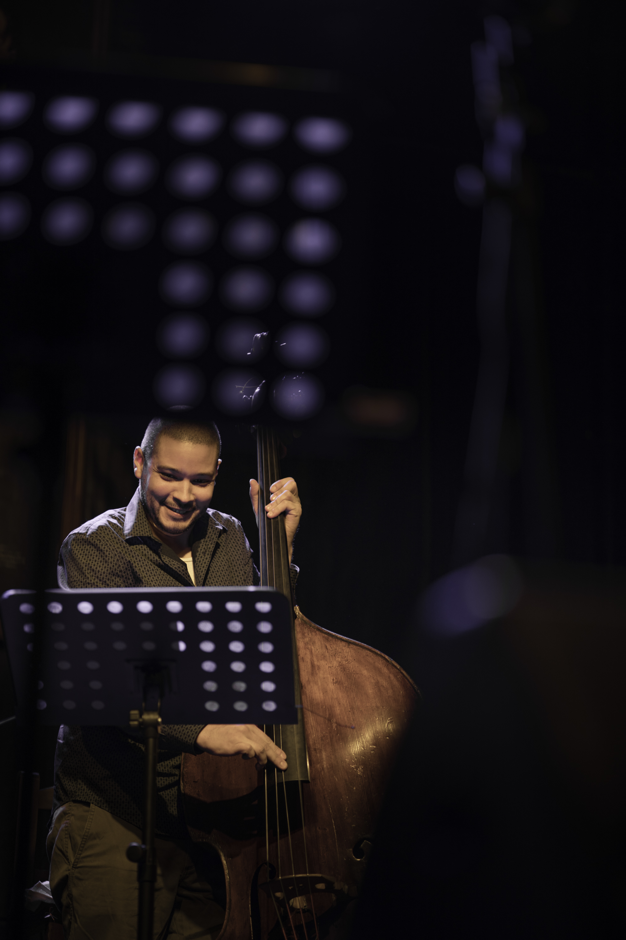 Luques Curtis / bajo Mark Whitfield Jr / batería Josh Evans / trompeta Orrin Evans / piano Invitado especial: Grant Stewart / saxo tenor 21 Festival Internacional de Jazz de Punta del Este El Sosiego, Punta del Este, Maldonado, Uruguay Camera: Canon EOS 5D Mark IV Lens: Zeiss Makro-Planar T* 2/100 ZE 0 ISO: 400